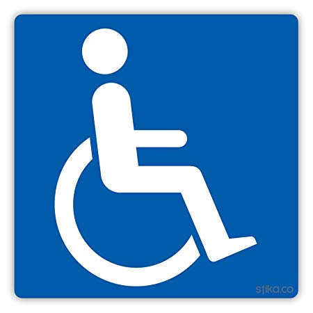 Irisgarritasunaren sinbolo internazionala